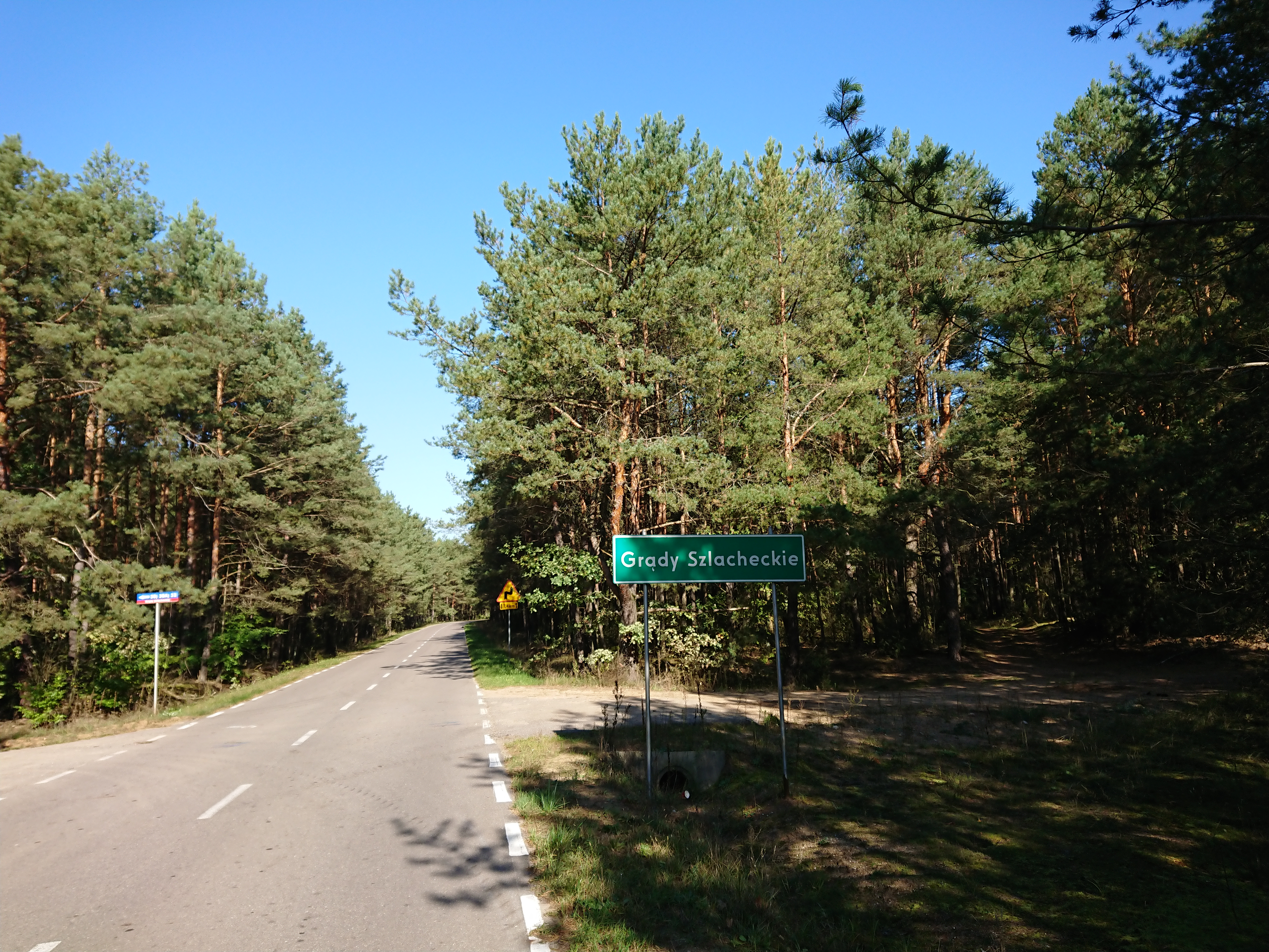 Wjazd do Grąd Szlacheckich